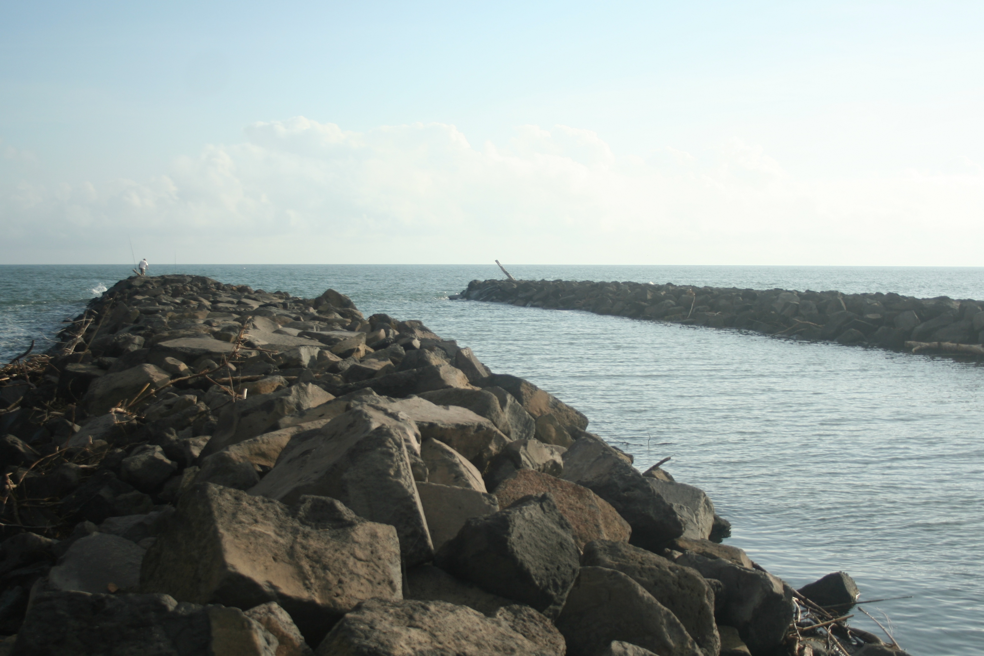 Vias (Hérault, Languedoc-Roussillon, France) - embouchure du Libron dans la Méditerranée.